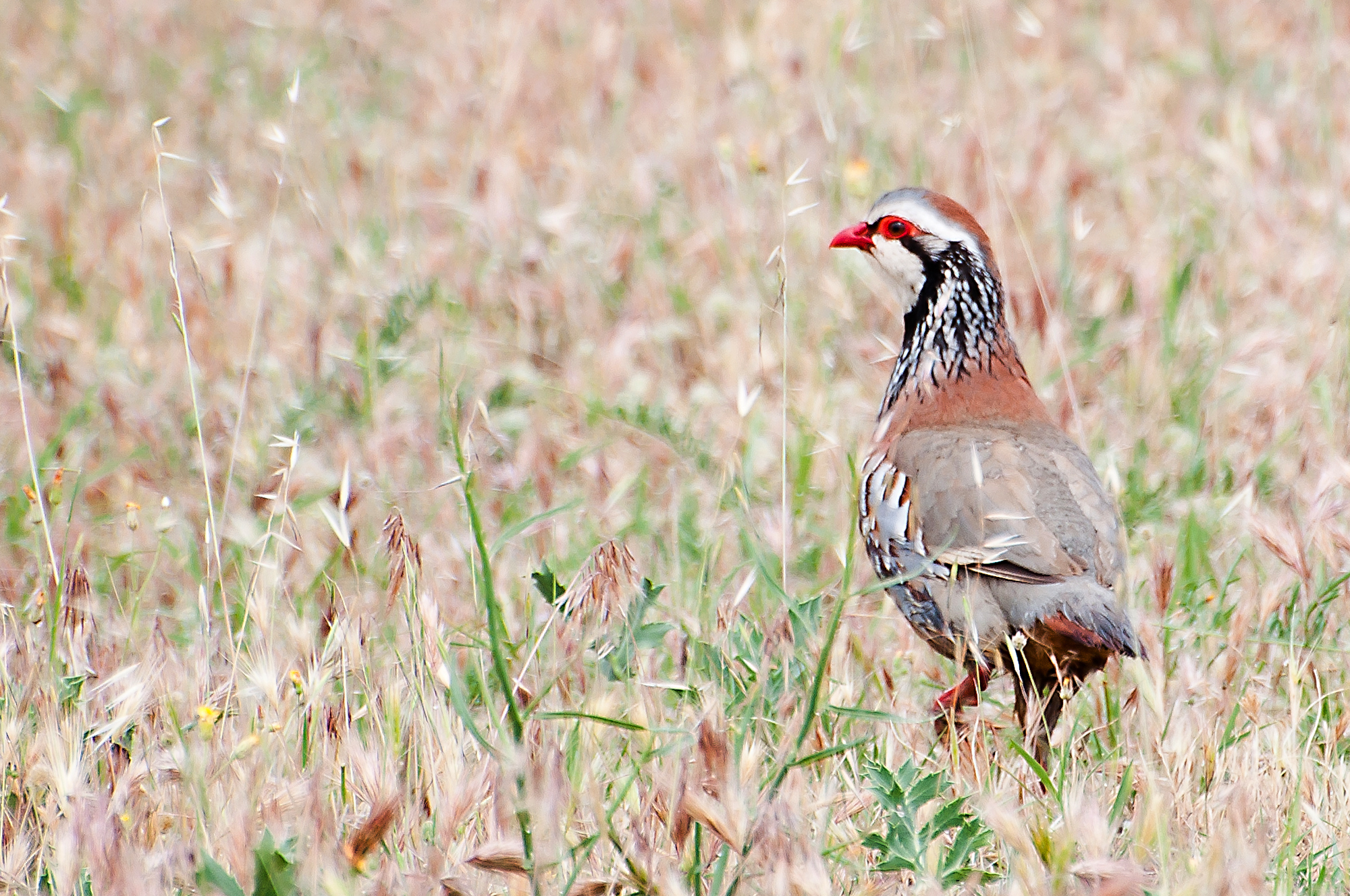 Perdiz Roja - Alectoris rufa, Toledo, España